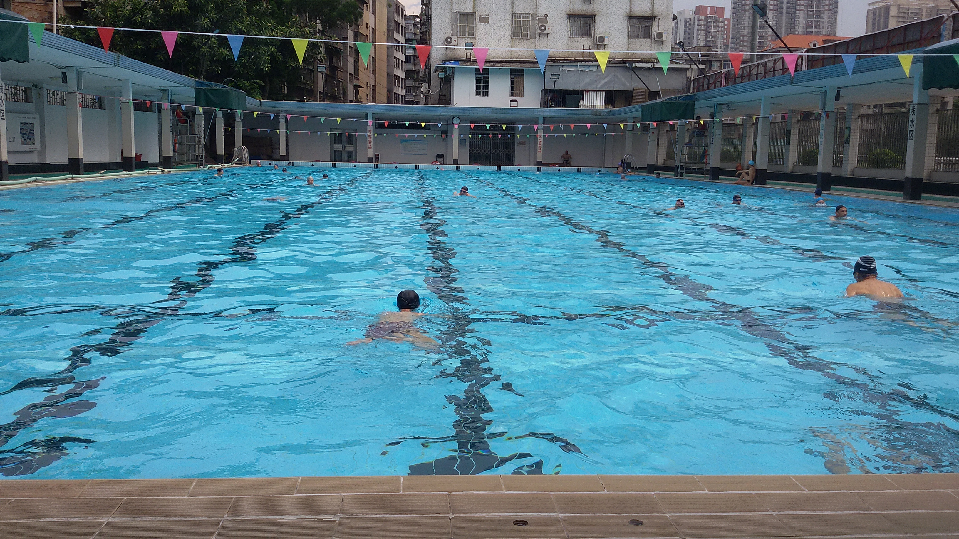 粵語: 寶崗泳場嘅室外池